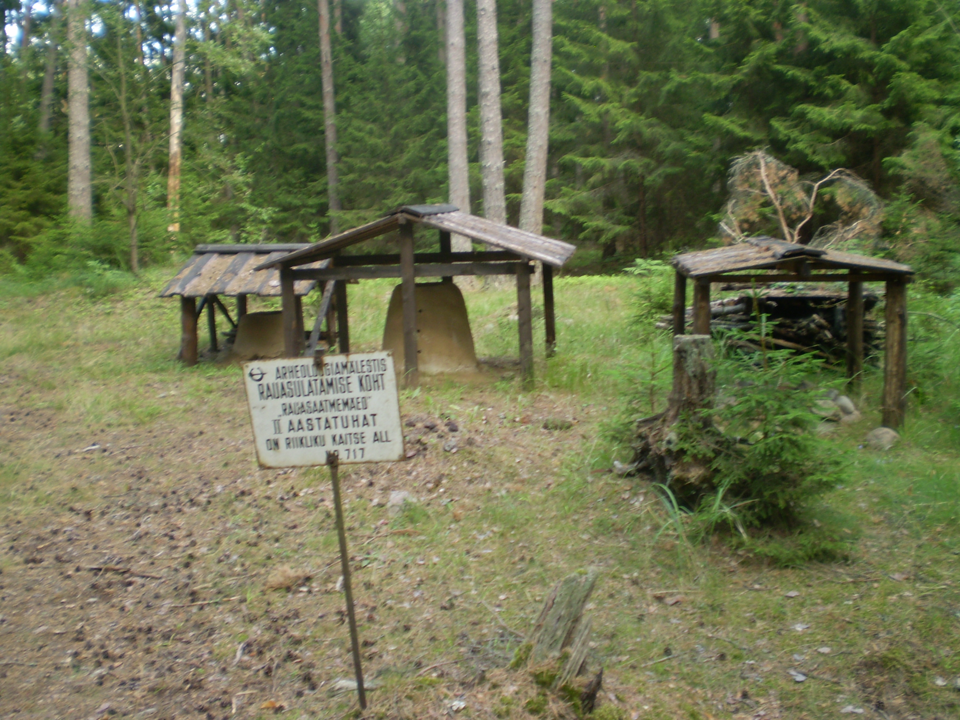 Rauasulatuskoht Rauasaatmemäed